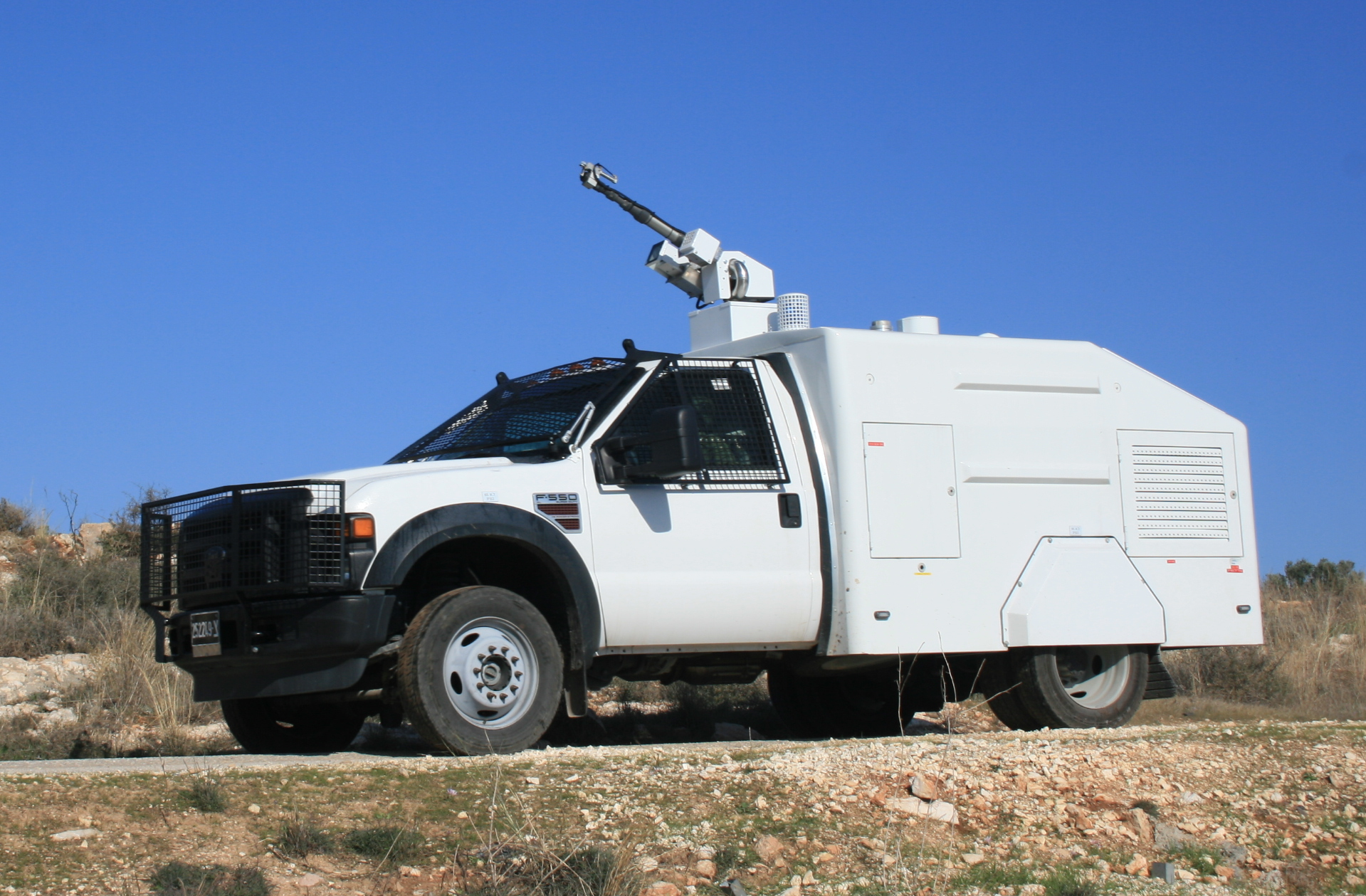 מכלית בואש (אמצעי לפיזור הפגנות) בהפגנה בבלעין דצמבר 2011UnknownUnknown skunk (weapon) in bil'in, december 2011